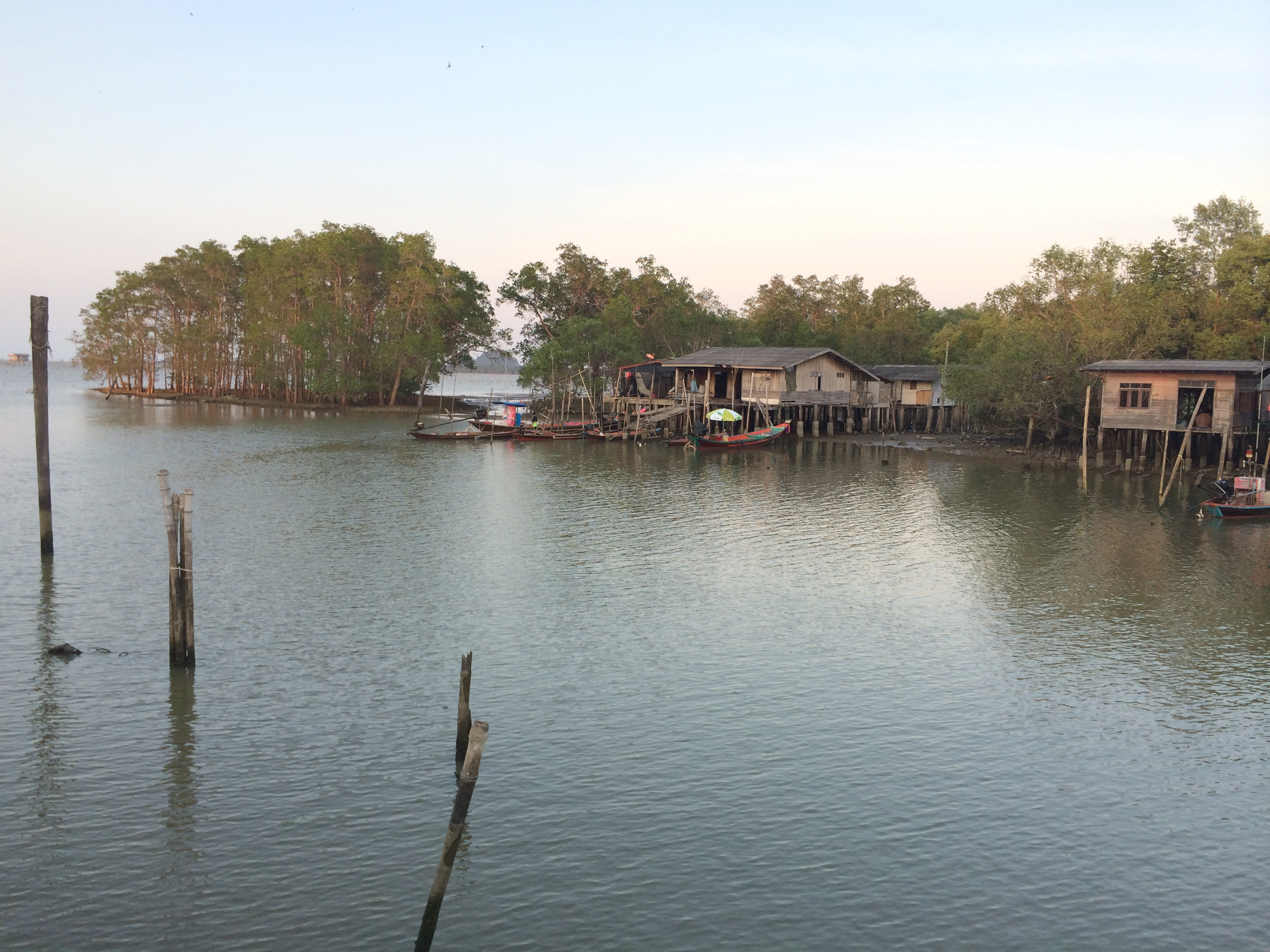 4177, Tambon Kadae, Amphoe Kanchanadit, Chang Wat Surat Thani 84160, Thailand